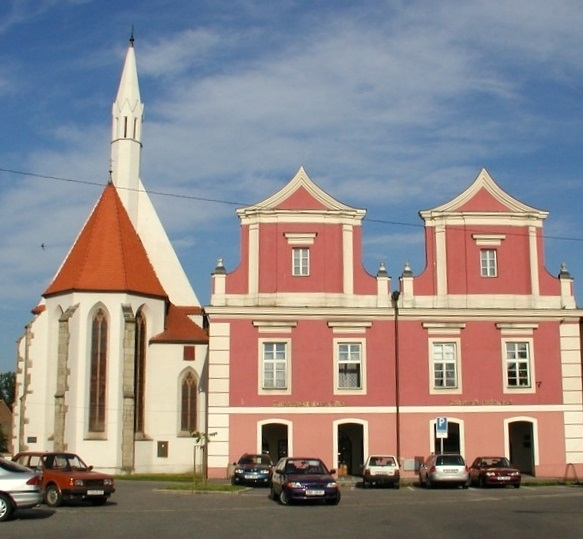 Soběslav, stará radnice a kostel sv. Víta